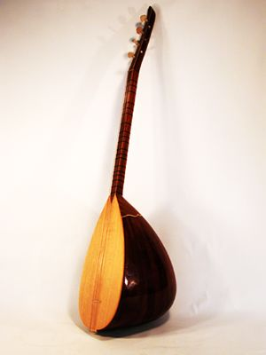 Turkish Baglama